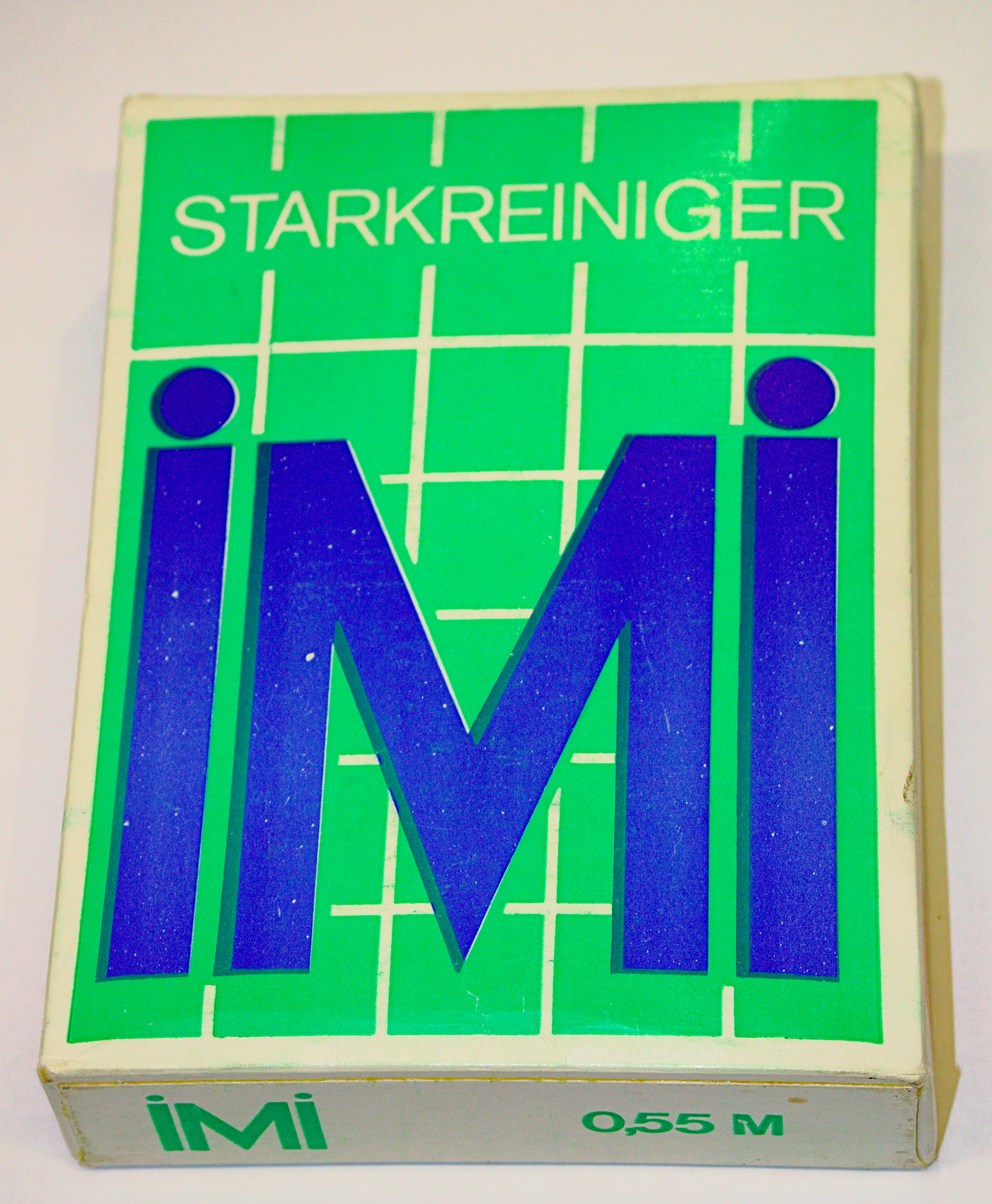 IMI-Starkreiniger-Verpackung, Vorderseite